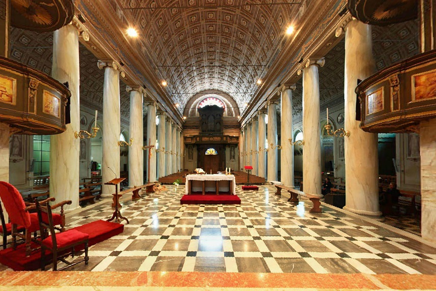 Infilata prospettica delle colonne della chiesa prepositurale di Corbetta vista dall'altare maggiore